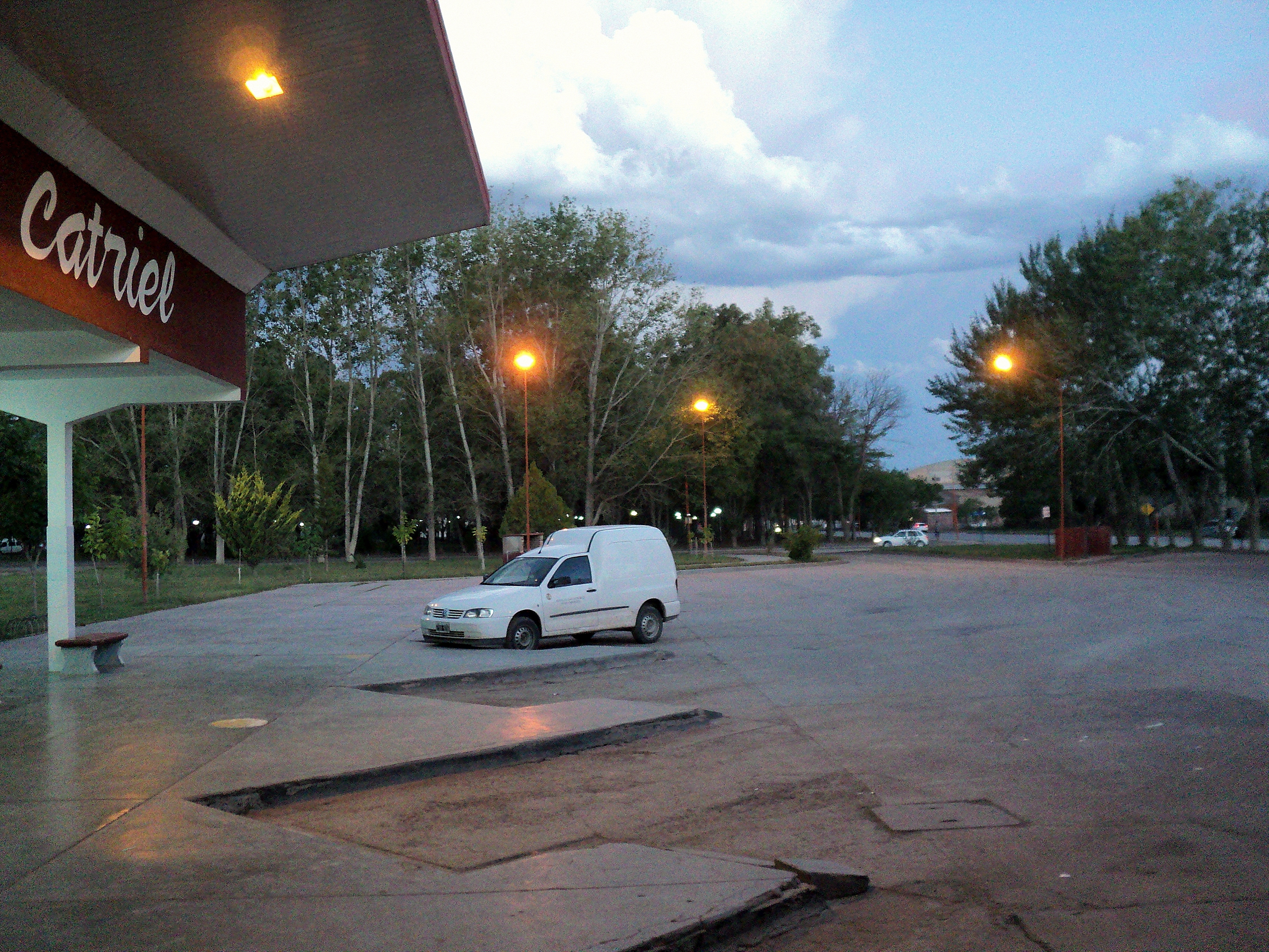 catriel su terminal